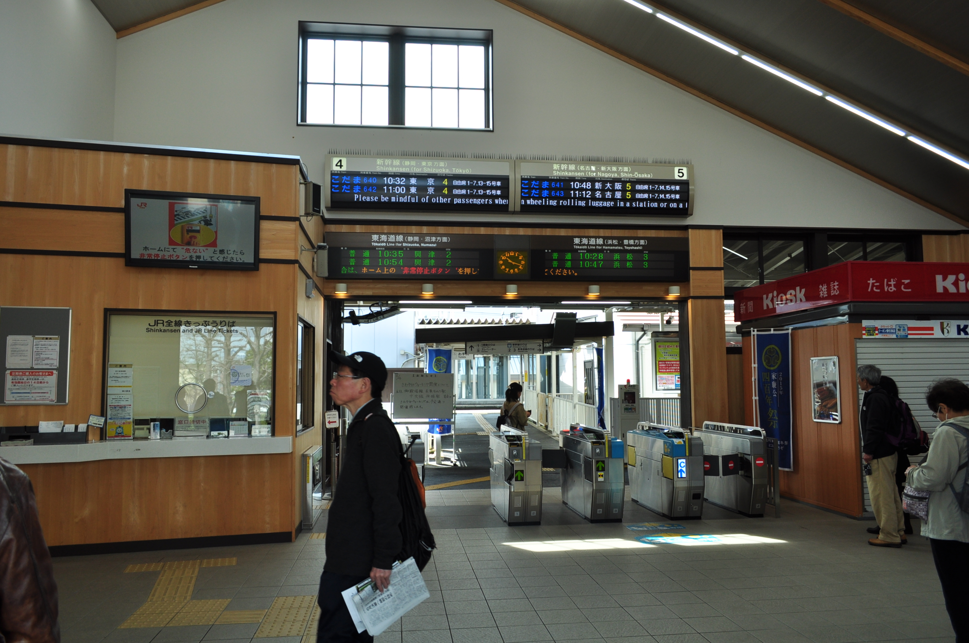 （2015年4月4日撮影）